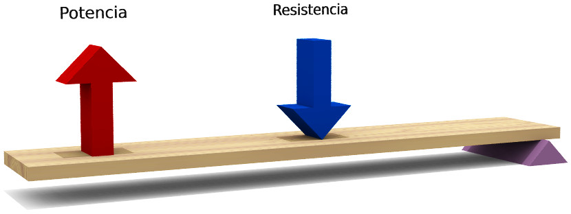 Ilustración que muestra a una palanca de tipo 2. Copyright © 2004 César Rincón. Imagen creada para la Wikipedia en Español.